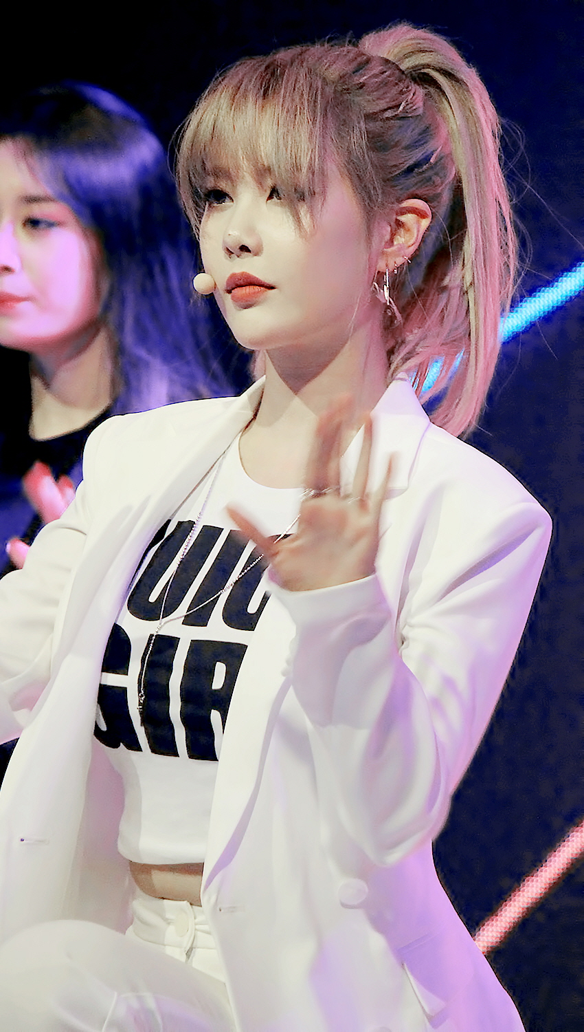 170614 티아라 쇼케이스 직찍